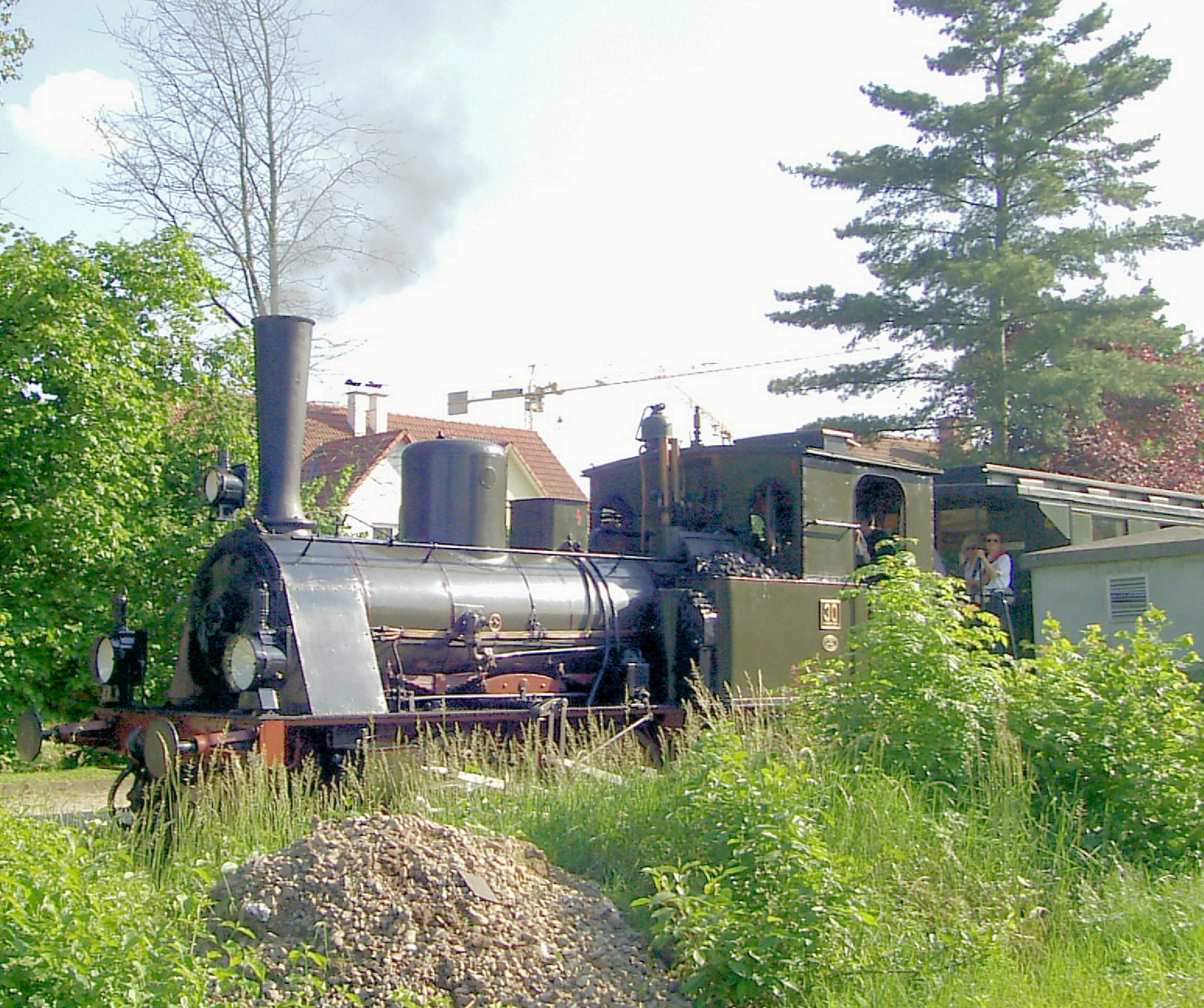 Dampflokomotive Chanderli der Kandertalbahn in Binzen. Halt anlässlich des 34. Binzener Dorffestes.